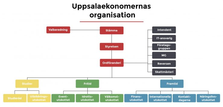 Uppsalaekonomernas Organisationskarta